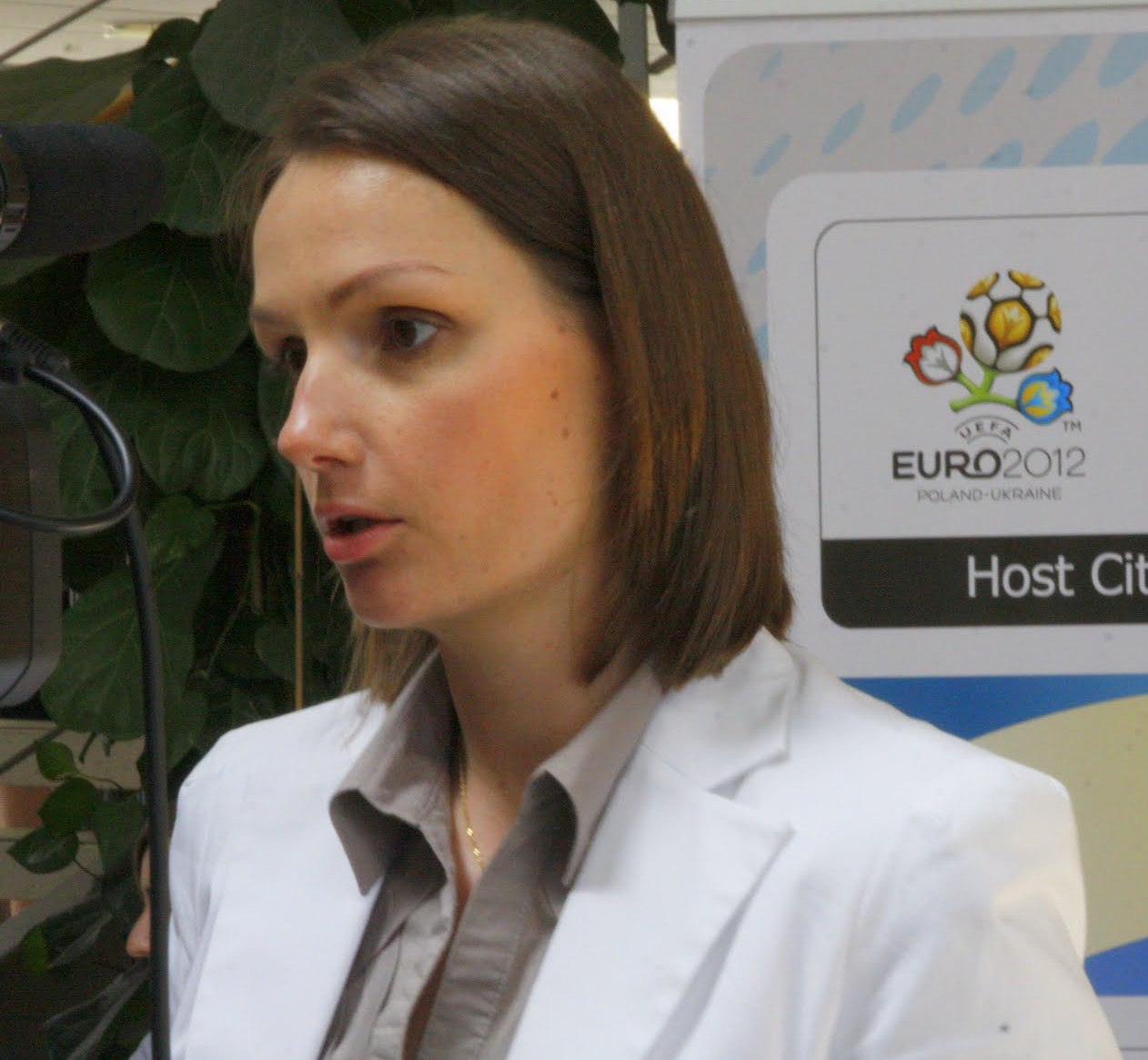 Jagna Marczułajtis-Walczak, posłanka.